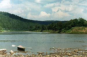 Ufa river near Arti, Sverdlovsk oblast